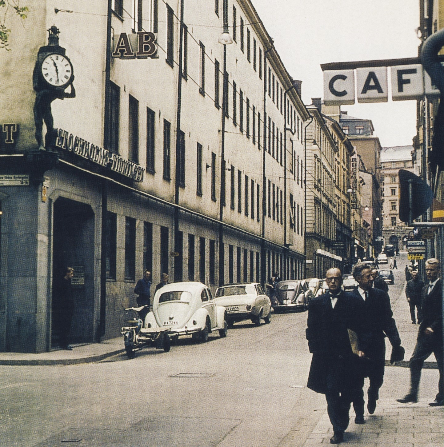 Vattugatan i Stockholm, vy mot öster, Kvarteret Svalan t.v.